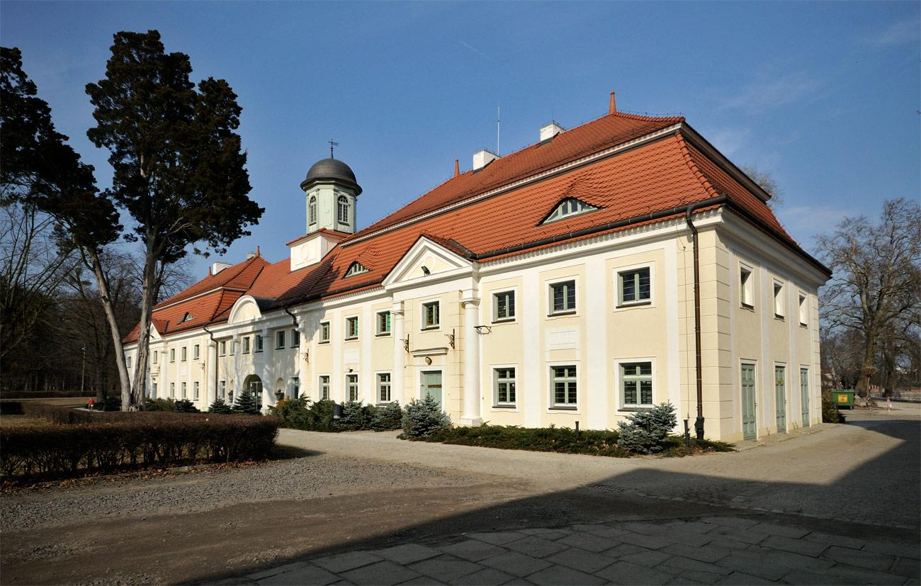 Dawna pałacowa oficyna.